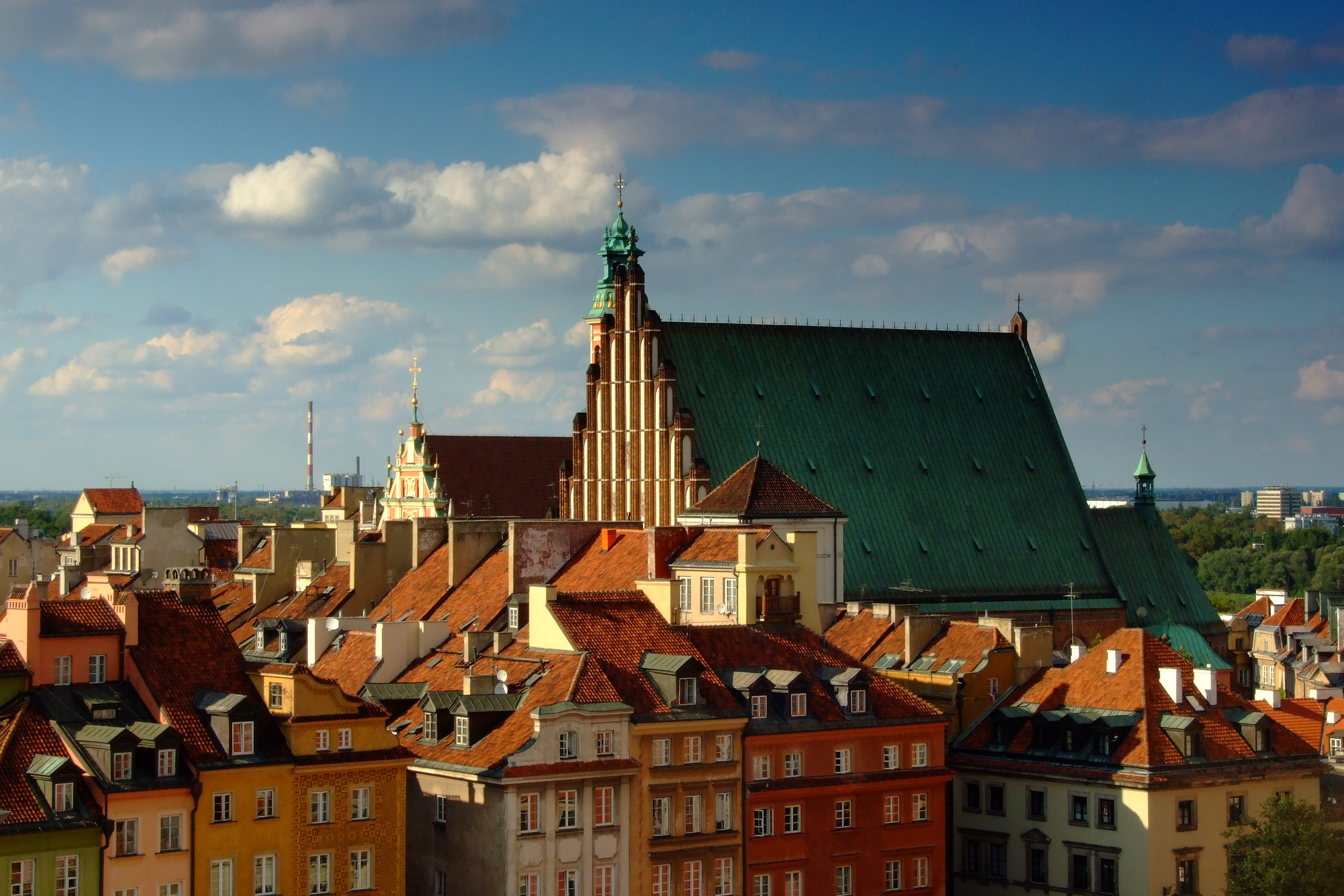 Warszawa - Katedra p.w. św. Jana - widziana z wieży kościoła św. Anny